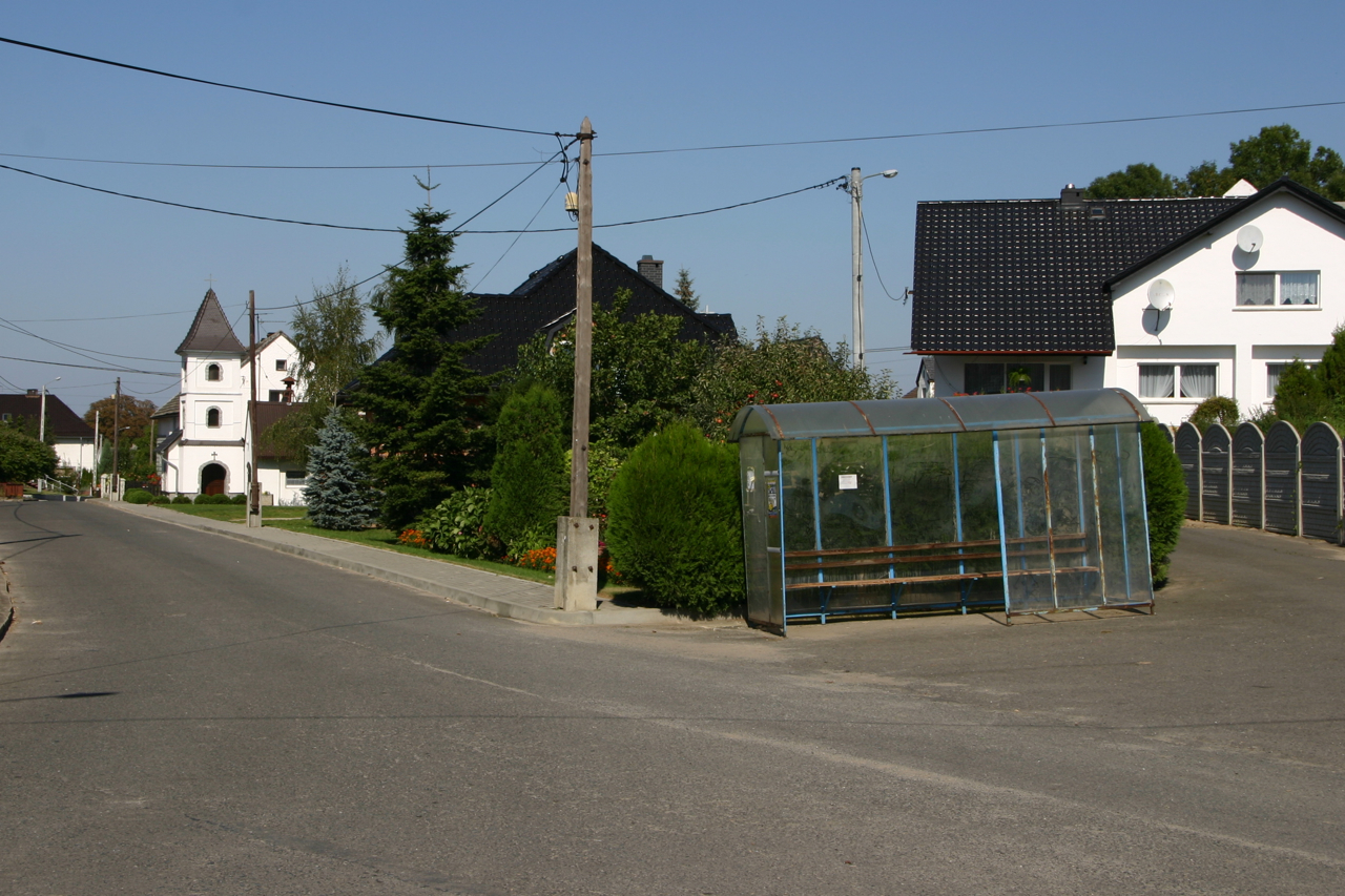 Browiniec Polski (dodatkowa nazwa w j. niem. Probnitz) – wieś w Polsce położona w województwie opolskim, w powiecie prudnickim, w gminie Biała.